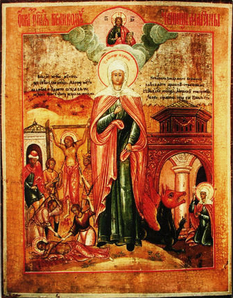 Икона «Святая Марина». Написана в России в 19 веке.Находится в частном собрании. Размер иконы 42x33 см.